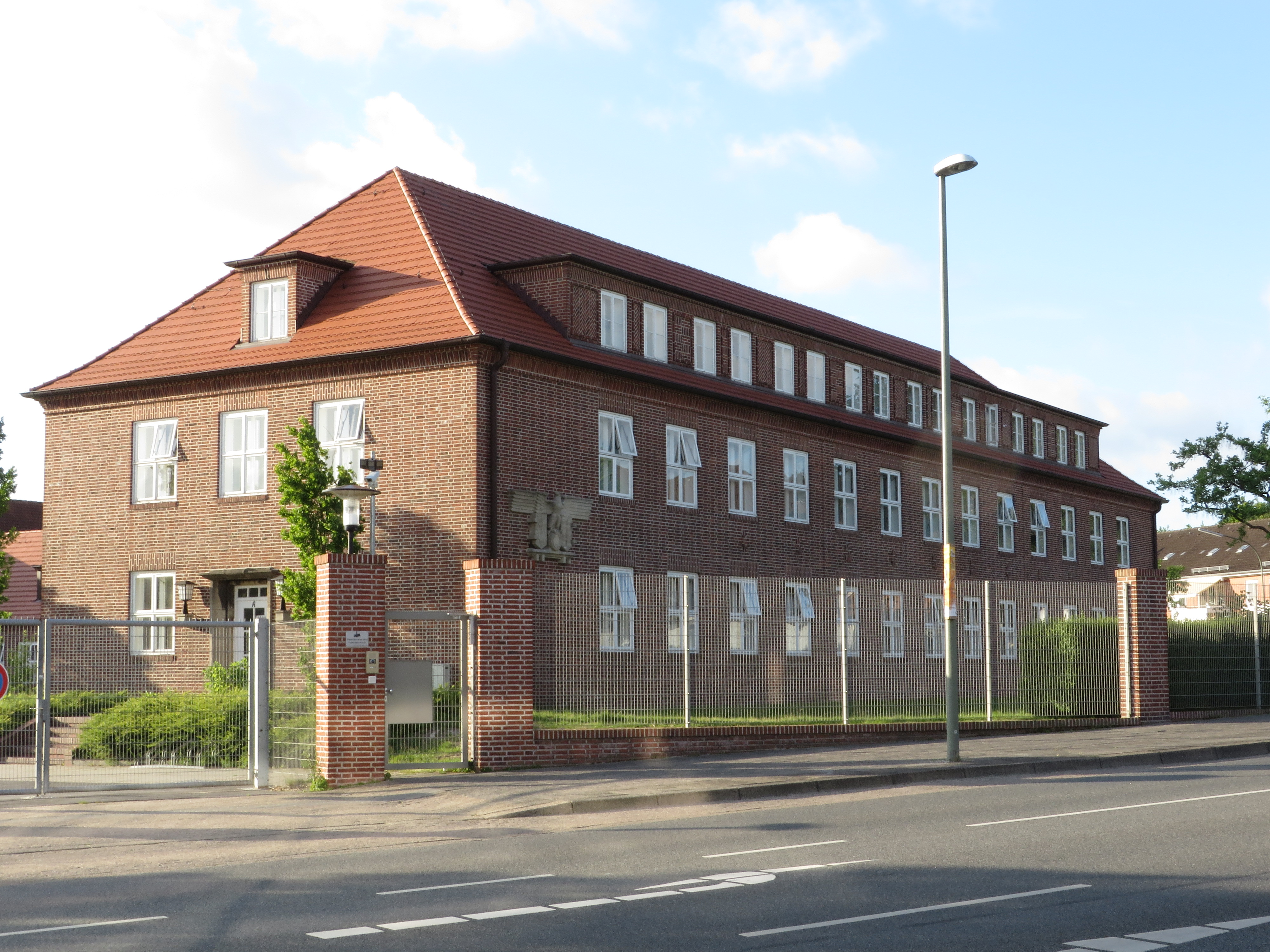 Die Sportschule Flensburg-Mürwik (Mai 2014), Bild 002